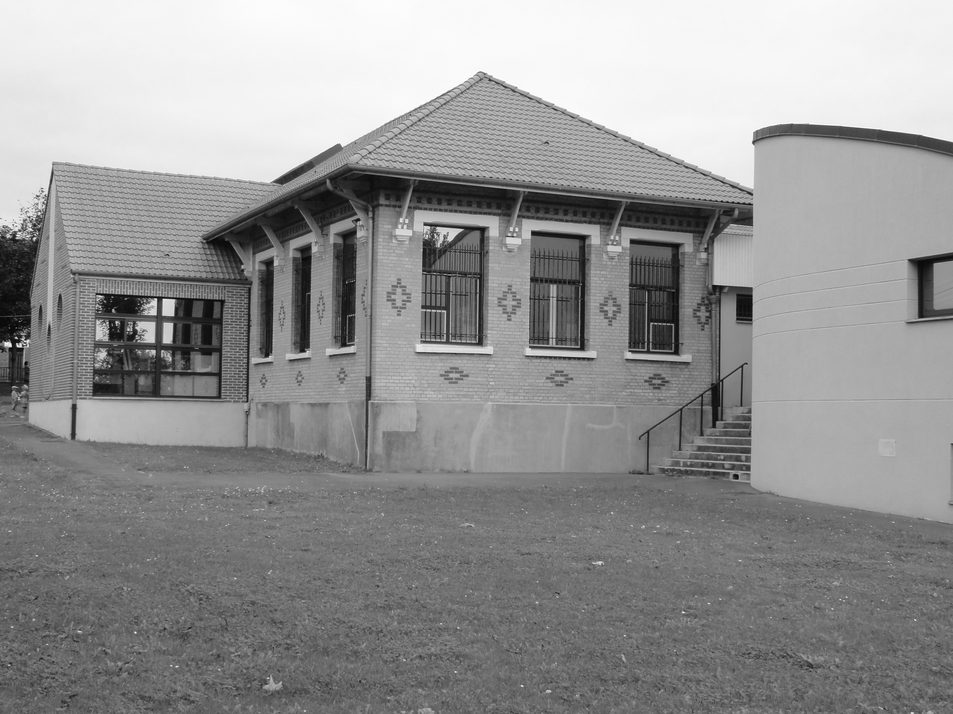 Écoles des cités de la Fosse n° 16 de la Compagnie des mines de Lens, Liévin, Pas-de-Calais, Nord-Pas-de-Calais, France.